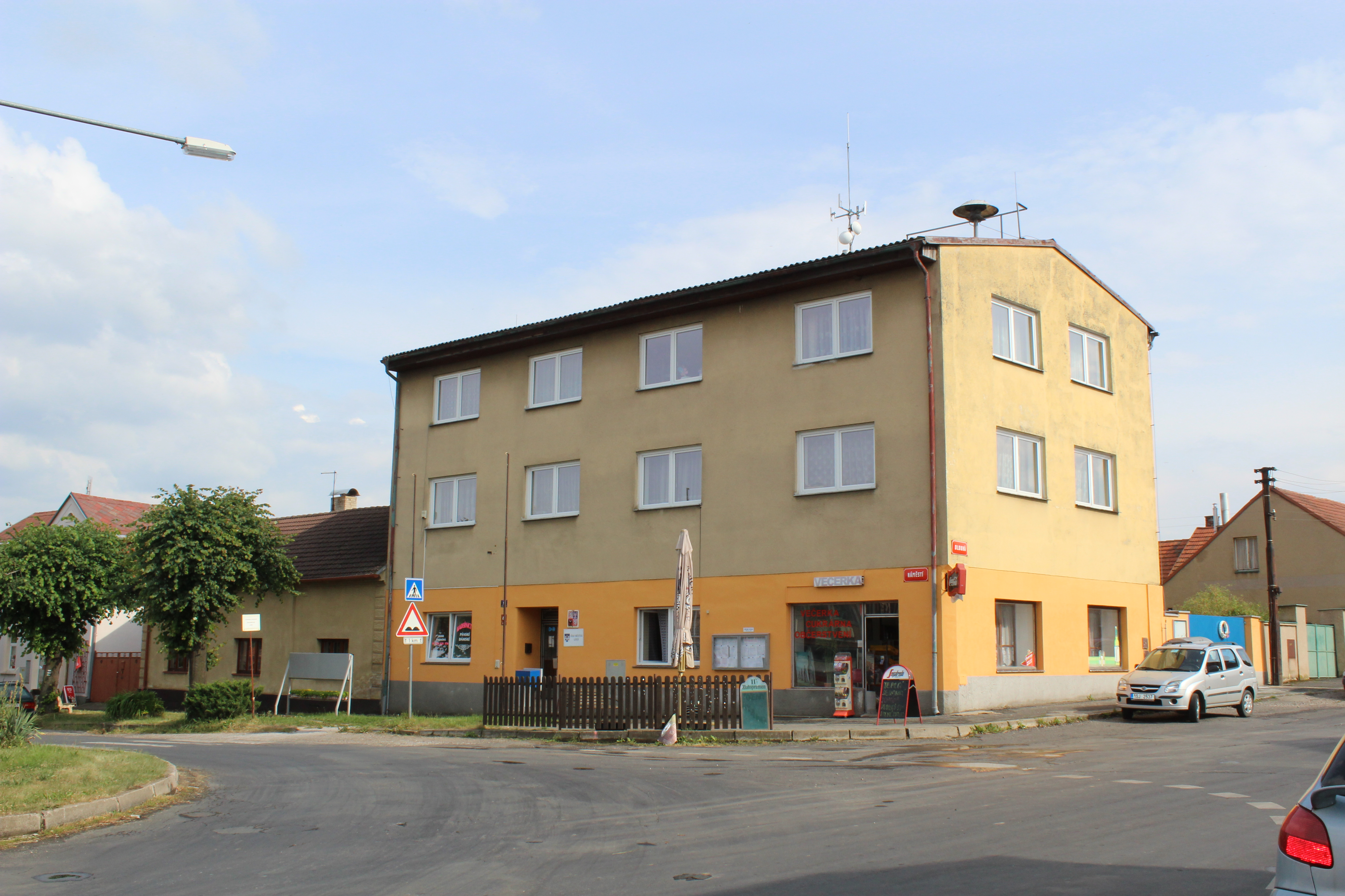 Budova úřadu městyse Liteň, Náměstí 71 z křižovatky náměstí. Klíčová slova: Areál – Atelier Svatopluk, o.p.s. – Beroun - Berounsko - botanika – cykloturistika - dendrologie – festival - fotografie – chráněná pracovní místo - Karlštejnsko – kovářství - kultura - Liteň – naučná stezka – osoby se zdravotním postižením – památky – sport - školy – technické památky – turistika – výlety – Úřad práce ČR – ubytování - vzdělávání